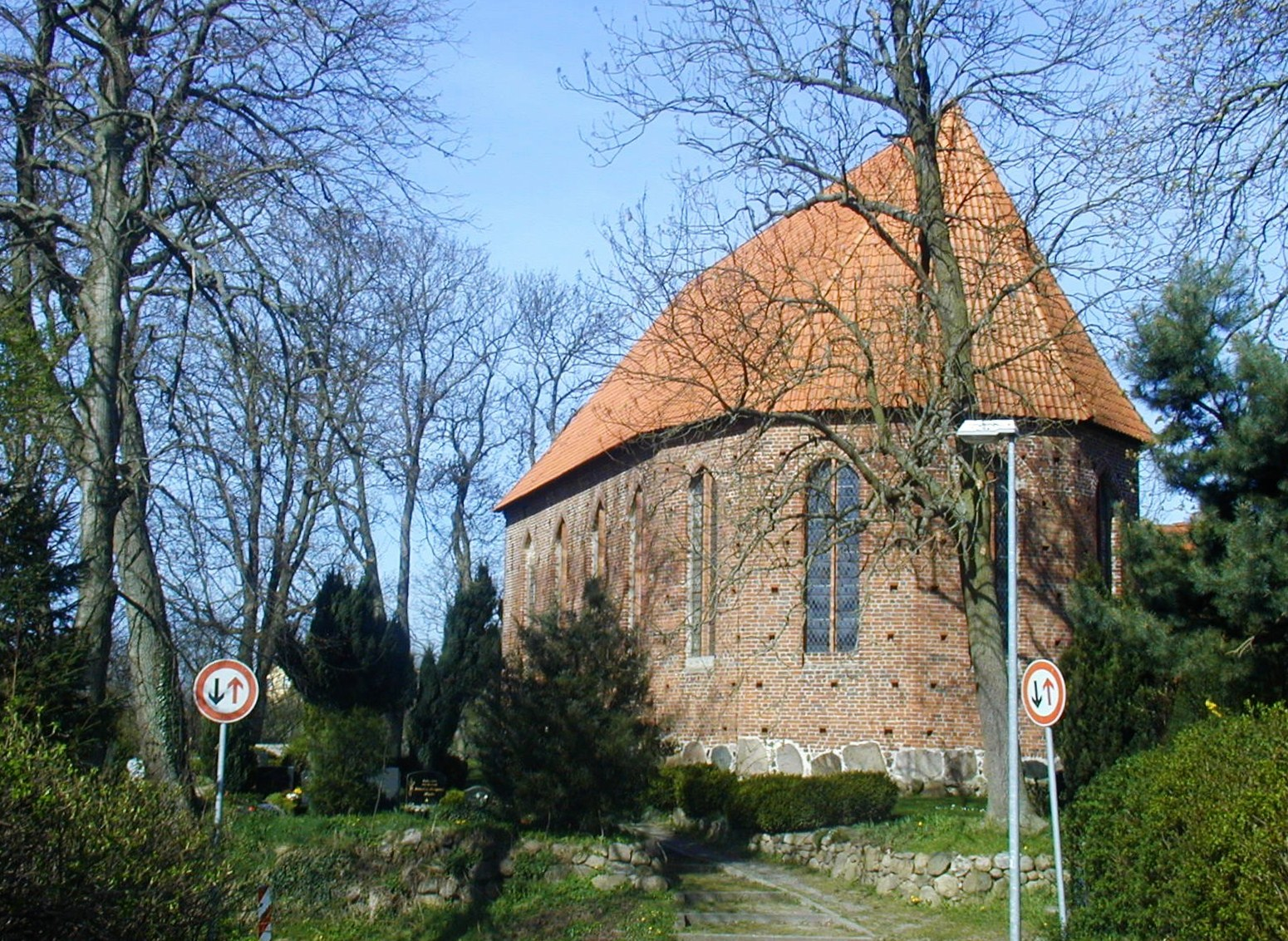 Die Voigdehäger Kirche ist der zentrale Platz in dem kleinen Ort. Ein Vorgängerbau stammte bereits aus dem 13. Jahrhundert. Sie war bis ins 18. Jahrhundert hinein die Mutterkirche der Stralsunder Pfarrkirchen.